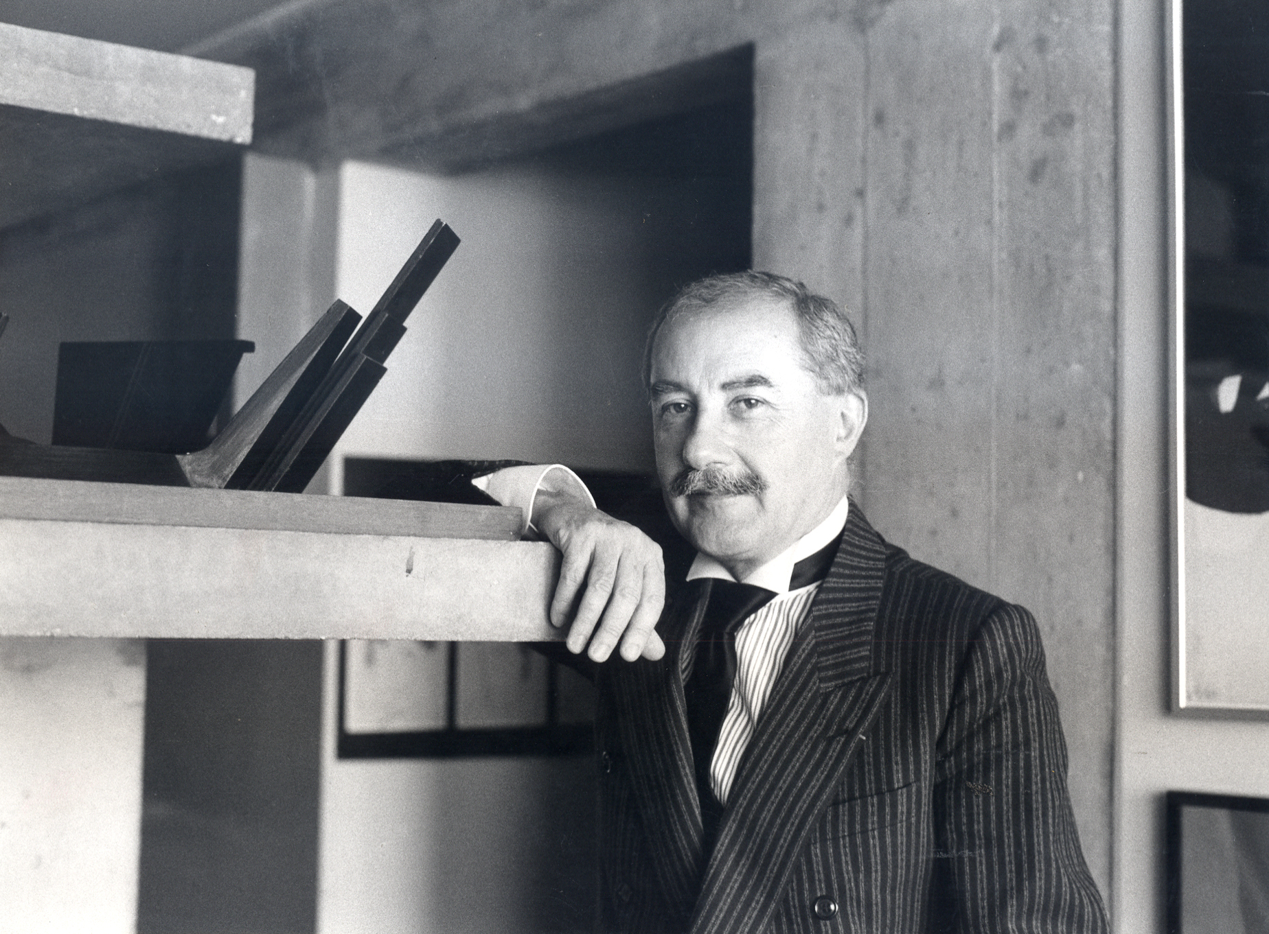 L'architecte Français, Claude Parent, dans les années 1980.